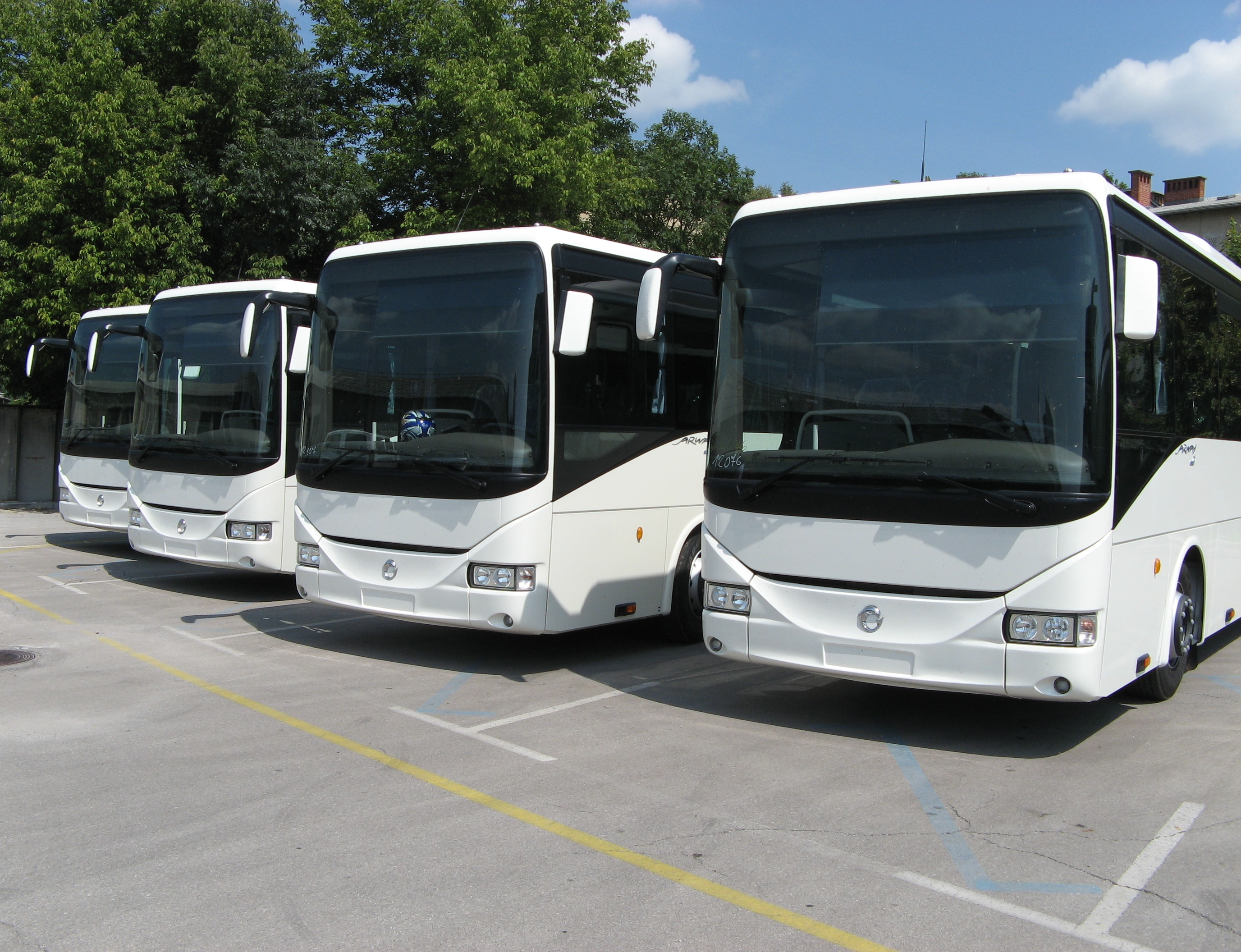 Irisbus arway v lasti podjetja LPP, slikan v remizi.